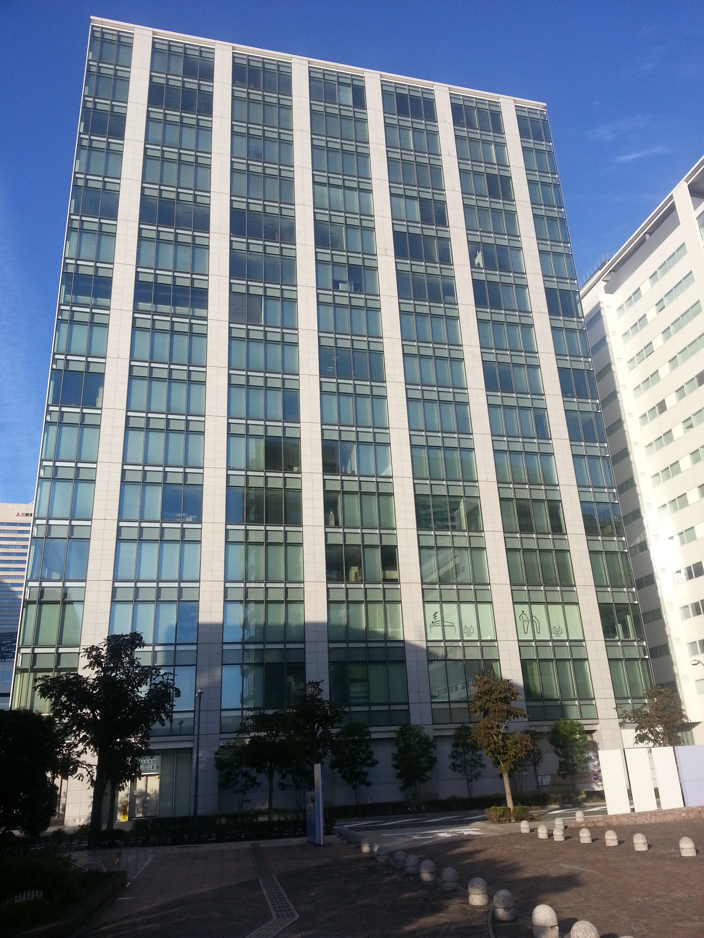 横浜みなとみらい地区にあるMMパークビル。